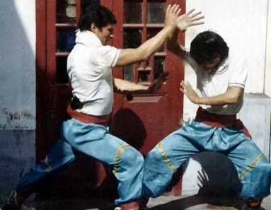 Sifu Adolfo Tijero til vänster